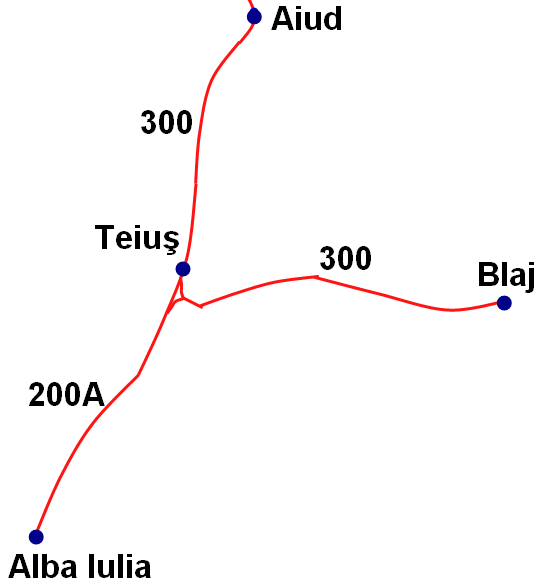 Schema nod feroviar Teiuş